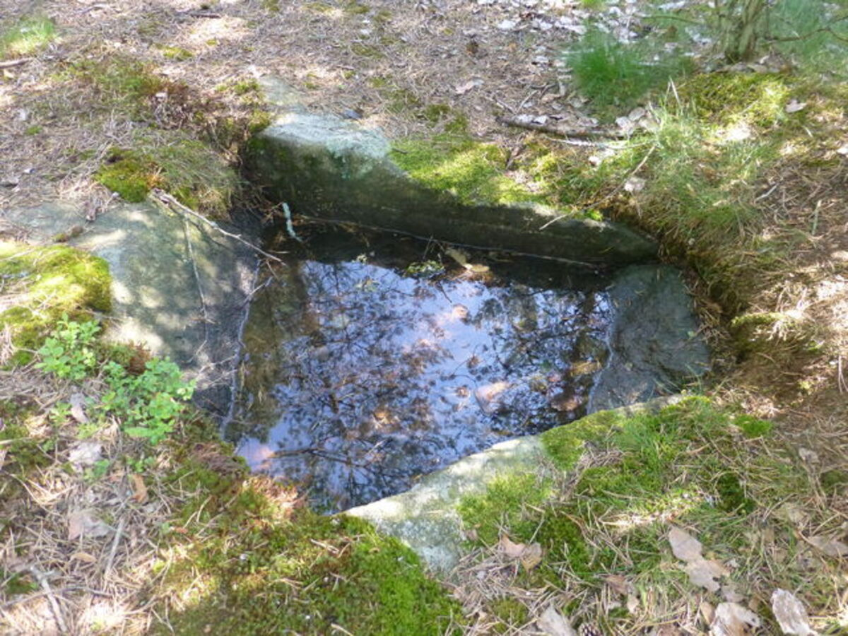 Huittisten Hiidenkallion lähde vuonna 2019